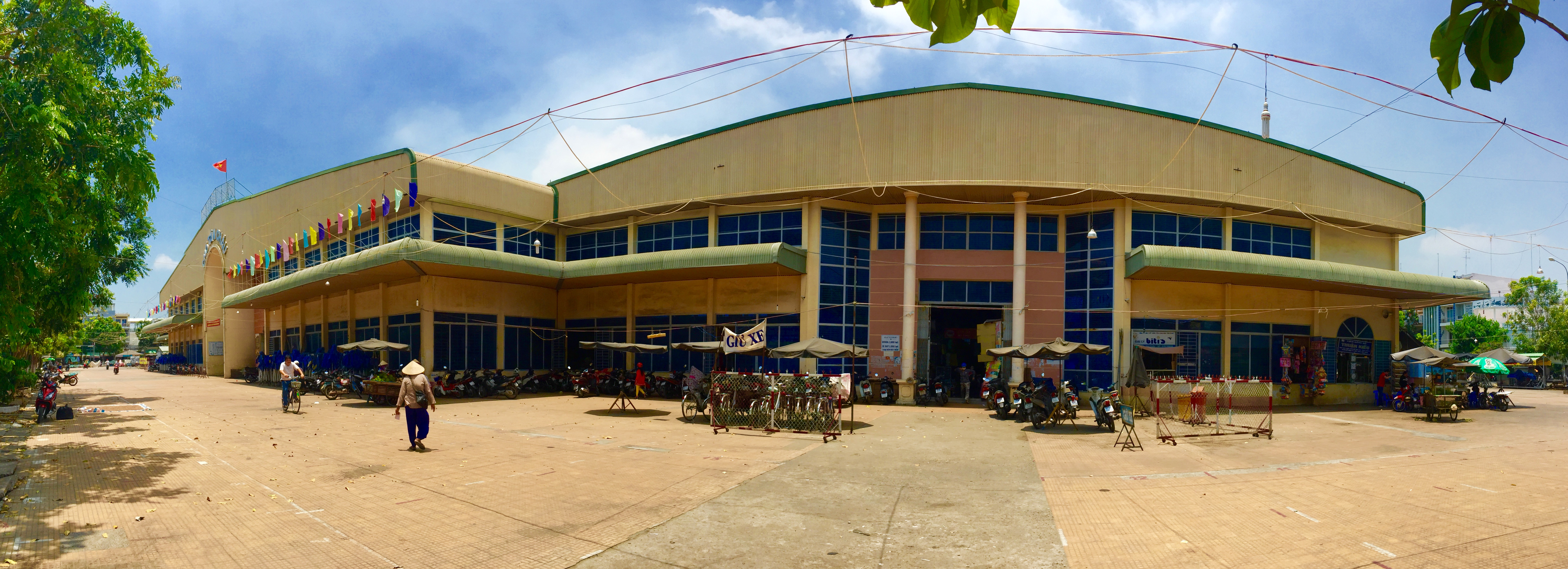 Cho Tan chau.xa Long Châu, tx. Tân Châu, An Giang, Việt Nam